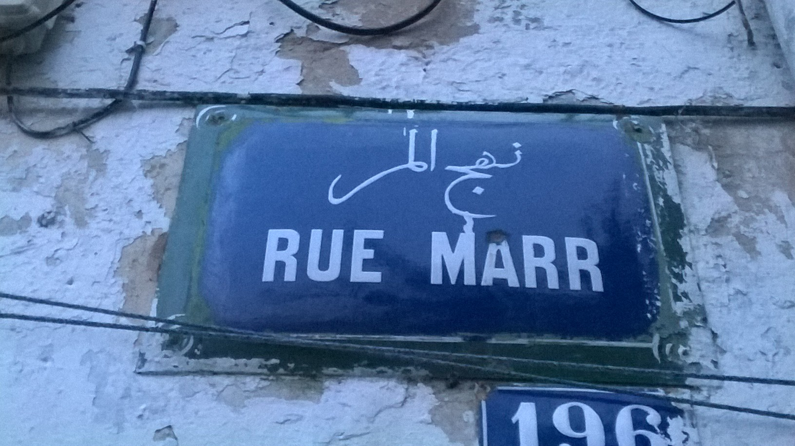 Sidi El Béchir , Tunis سيدي البشير ، تونس